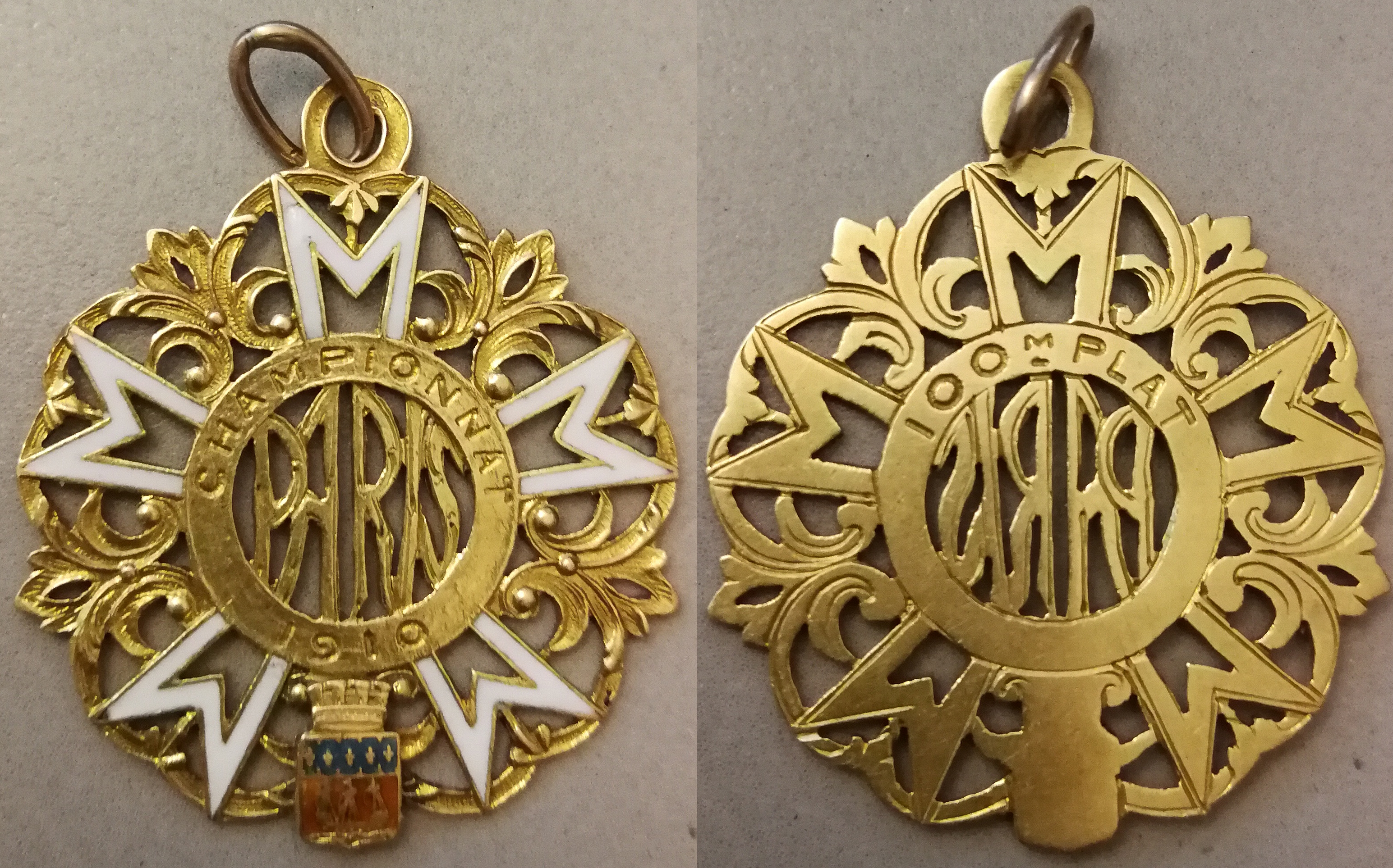 Médaille d'or décernée à Jean Pecqueriaux pour sa victoire du 100 mètres plat lors des Vème Championnats de Paris d'Athlétisme le 12 juin 1910